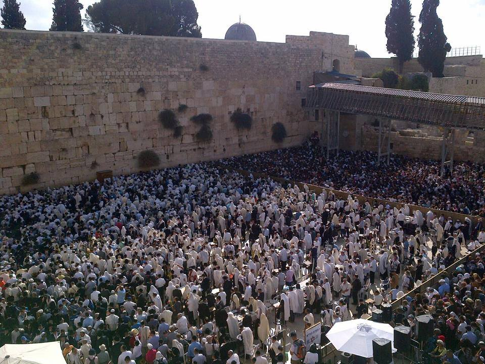 Jerusalem